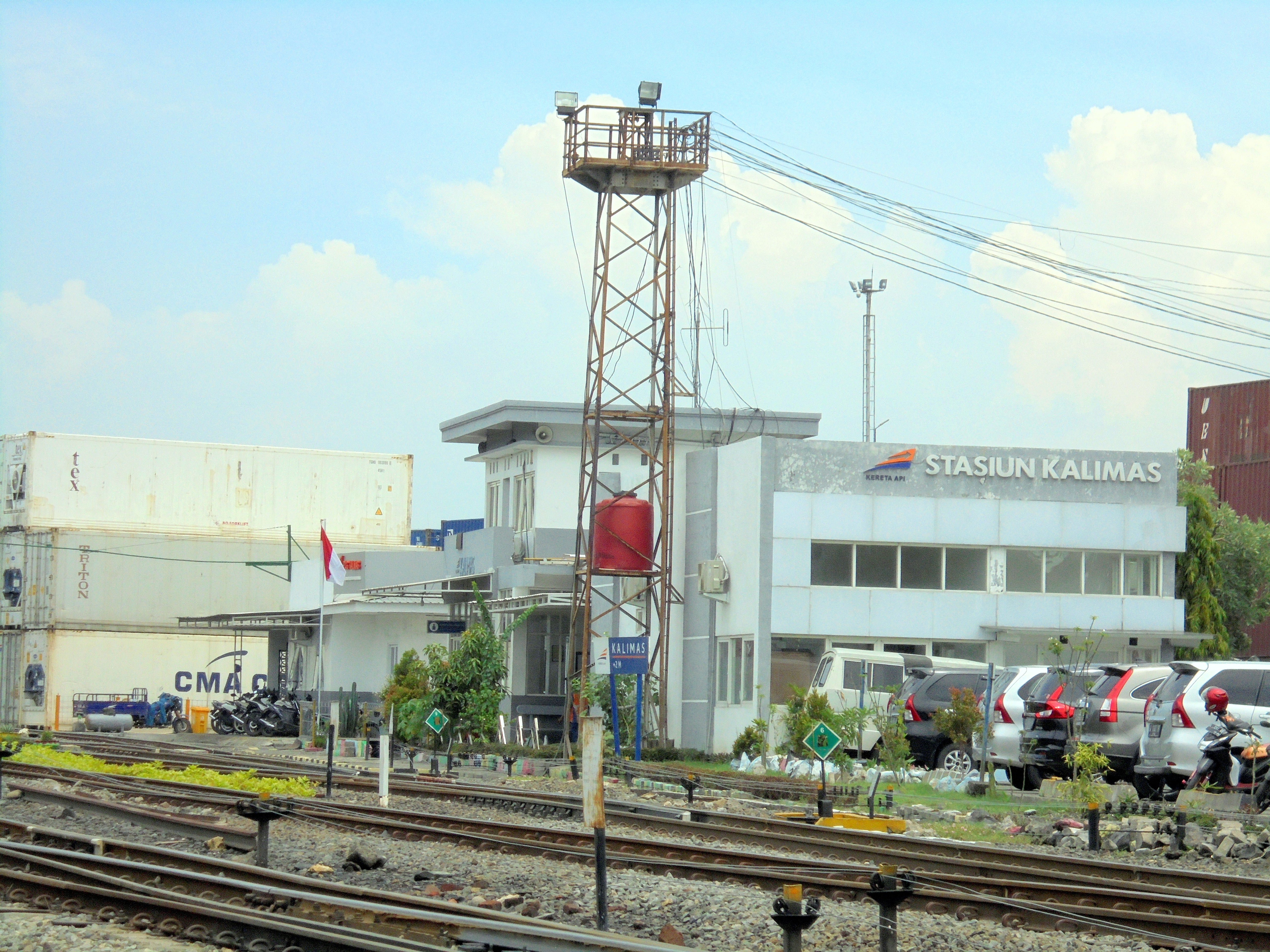 Bangunan Stasiun Kalimas tahun 2020. Stasiun ini hanya digunakan untuk bongkar muat peti kemas.